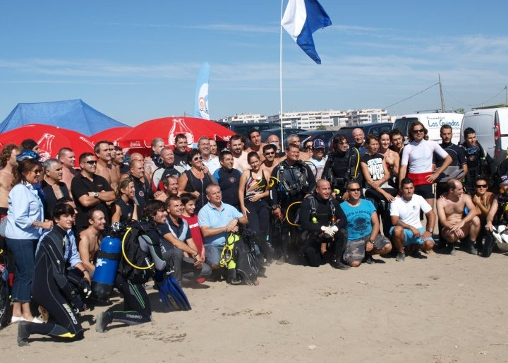 Buceadores de la V Jornada de Limpieza de Fondos Marinos Ciudad de Málaga. Playa de la Misericordia, Málaga.